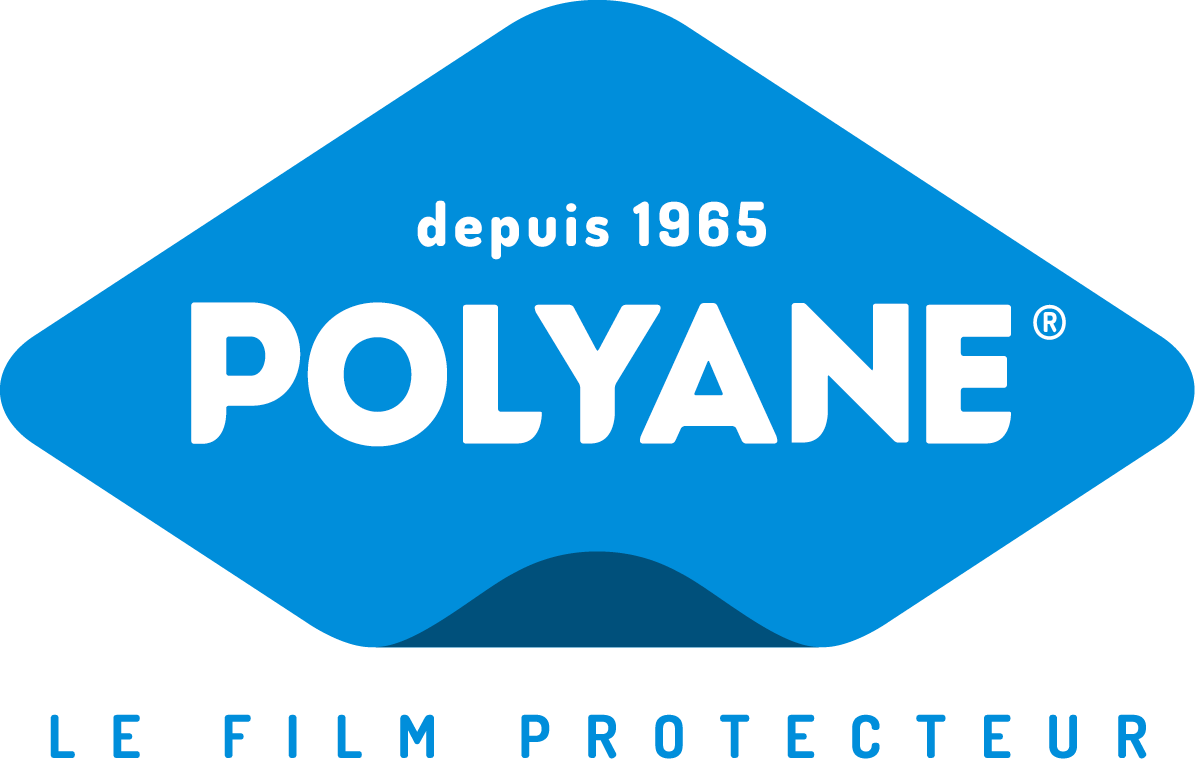 Logo de la marque française déposée Polyane